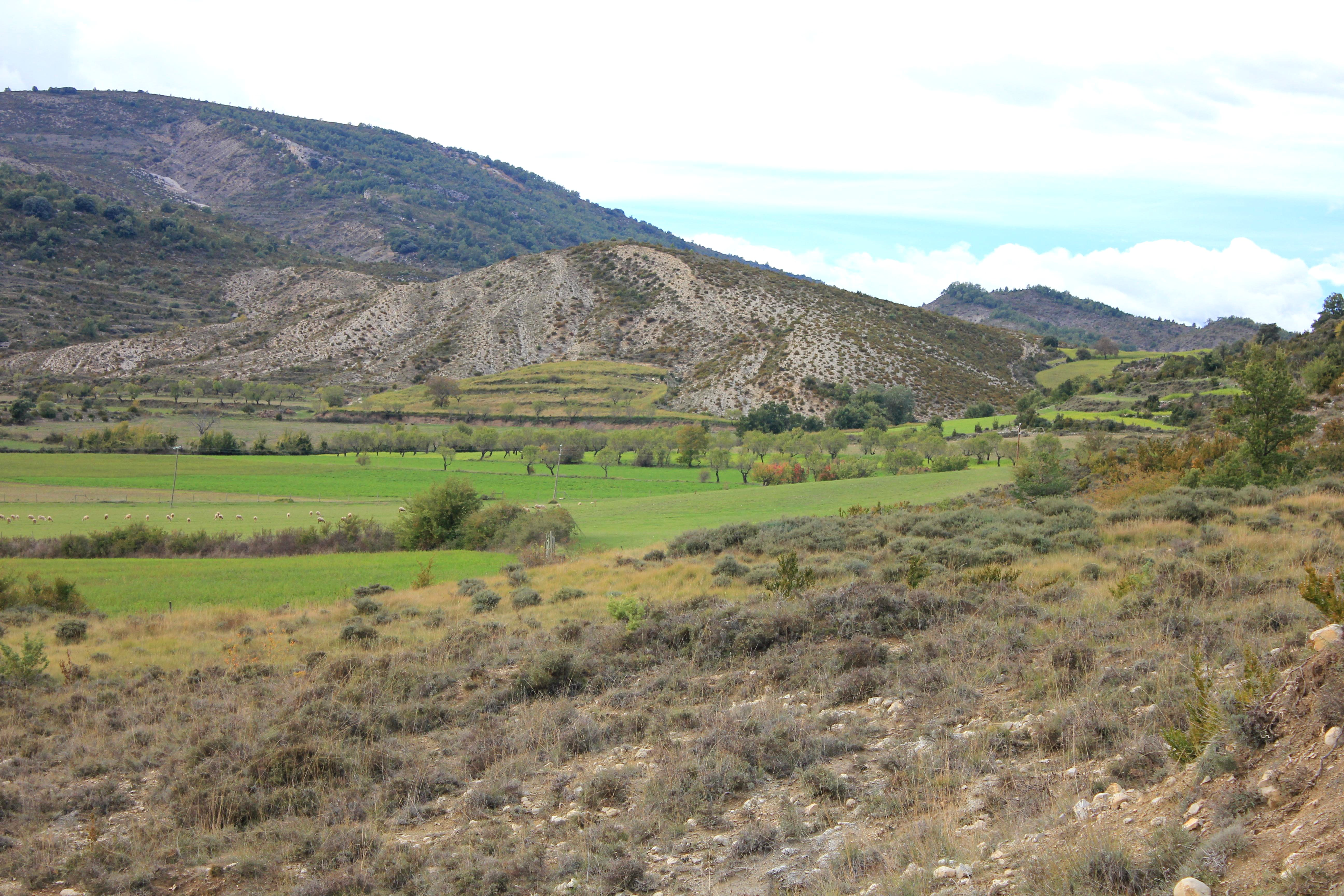 Aragonés: Os arredols de Pauls (Viello Sobrarbe, en octubre.